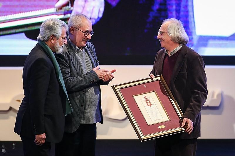 افتتاحیه سی‌وششمین جشنواره فیلم فجر - مراسم افتتاحیه سی‌وششمین جشنواره فیلم فجر شامگاه پنج‌شنبه ۱۲ بهمن ماه با حضور سیدعباس صالحی وزیر فرهنگ و ارشاد اسلامی و جمعی از هنرمندان و سینماگران در سالن همایش‌های برج میلاد تهران برگزار شد.